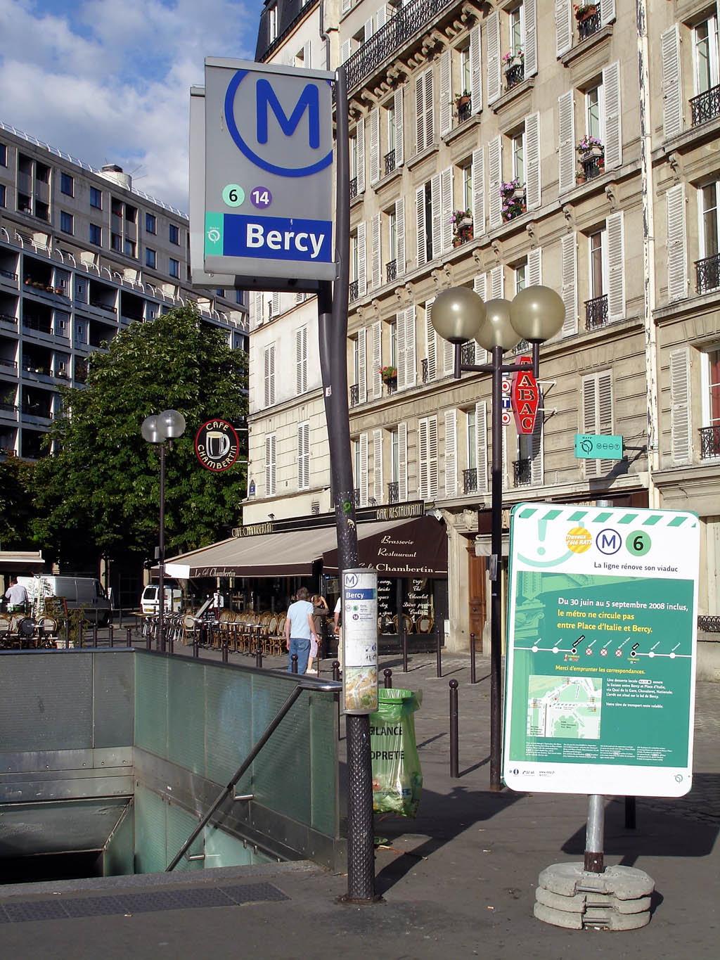 Entrée de la station Bercy du métro de Paris, France.